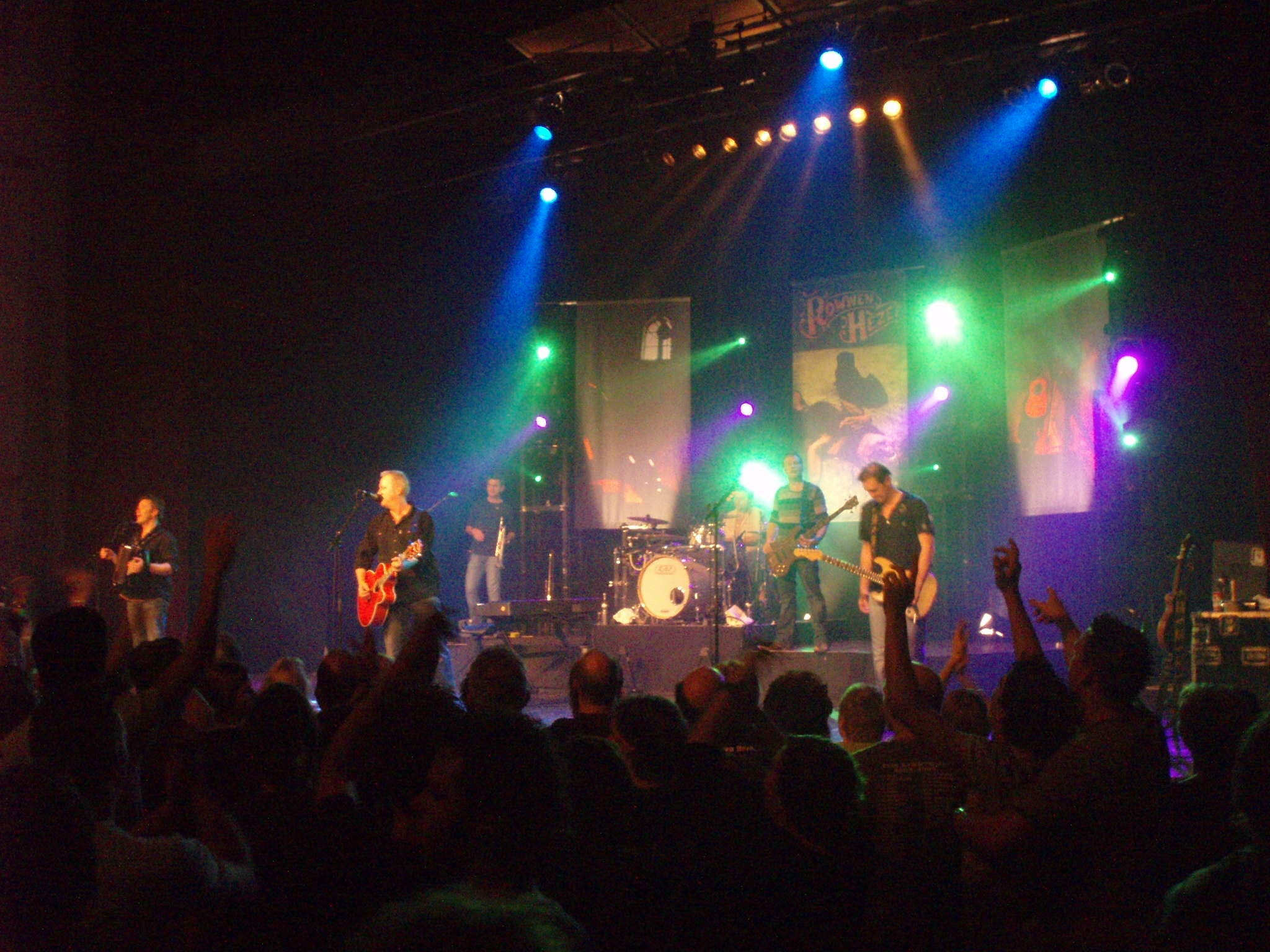 Rowwen Hèze in concert, Nijmegen, Netherlands